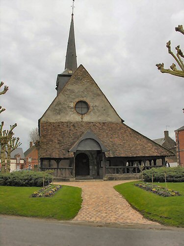 Église de Souvigny-en-Sologne et son caquetoire